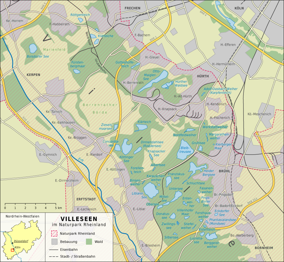 Villeseen